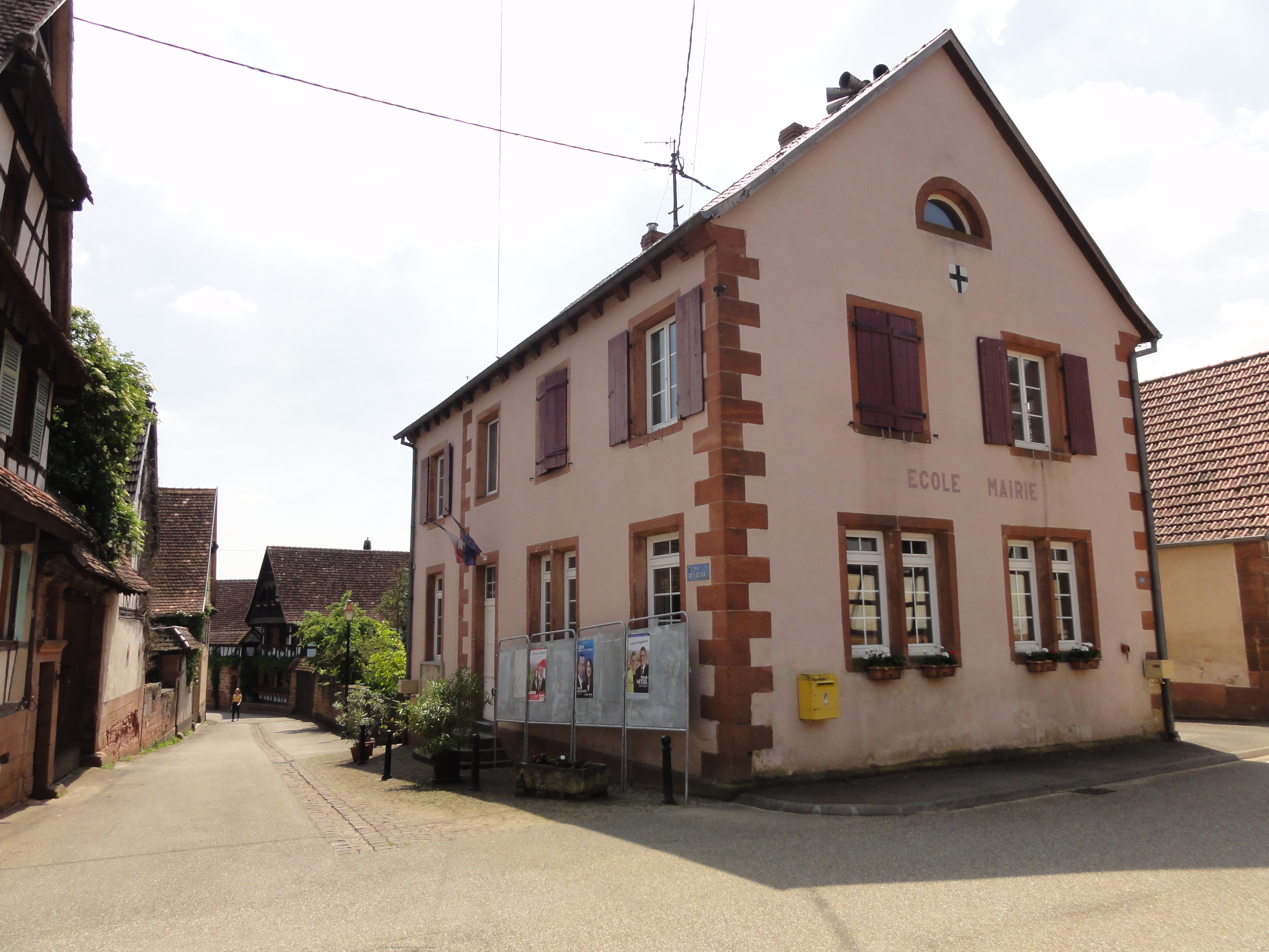 Alsace, Bas-Rhin, Bosselshausen, Mairie-école (XIXe), 15 rue Principale. .